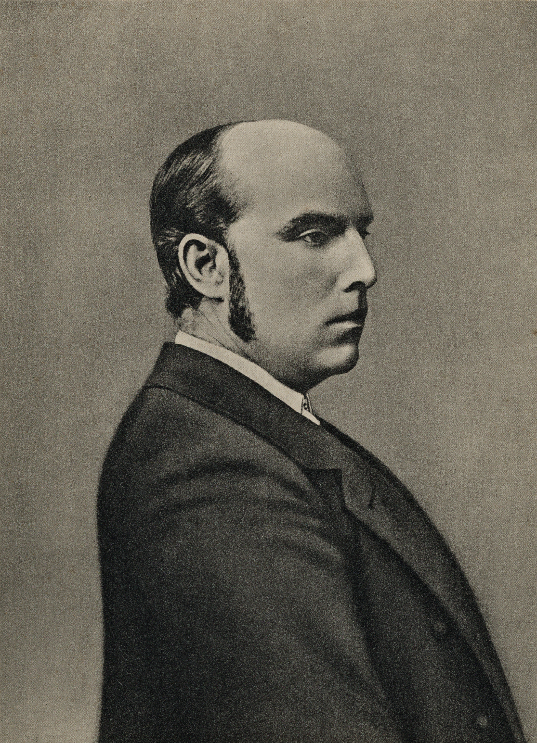 Format: Litografi Utgivelsesår / Published: 1914 (Vore Høvdinger 60). Utgiver / Publisher: F. Bruns Bokhandels Forlag, Trondhjem Eier / Owner Institution: Trondheim byarkiv, The Municipal Archives of Trondheim Arkivreferanse / Archive reference: Ila skole, Va - F9429